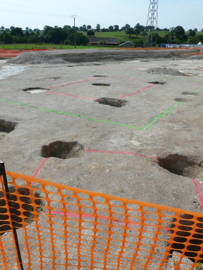 Oppidum de Moulay 53100, grande enceinte : quatre trous de poteaux plus deux (entrée) correspondant à une habitation, l'emprise correspond au tracé vert, avec en premier plan quatre trous correspondant à un grenier (tracé rouge premier plan)